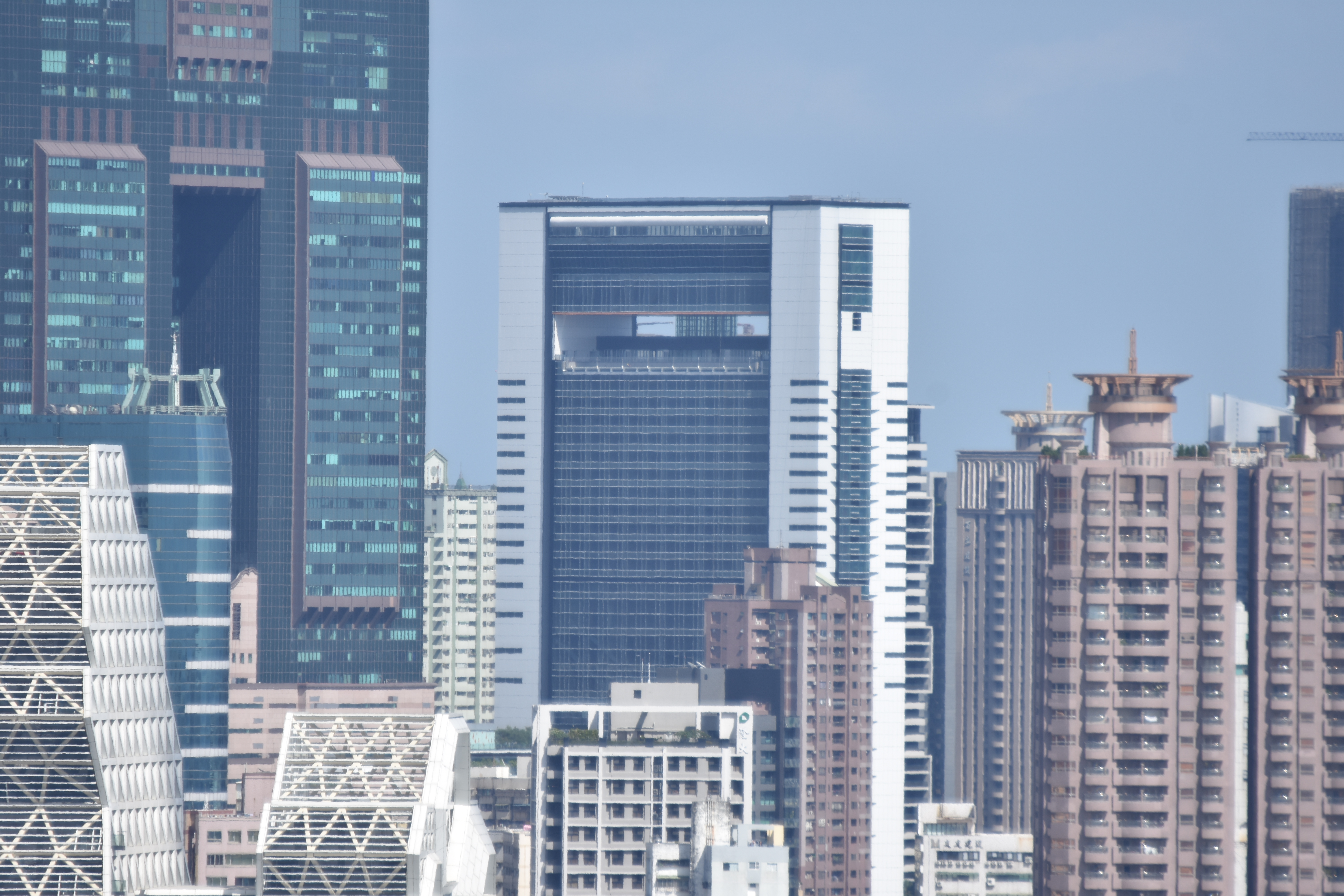 中文（台灣）: 高雄市立圖書館總館二期共構會展文創會館